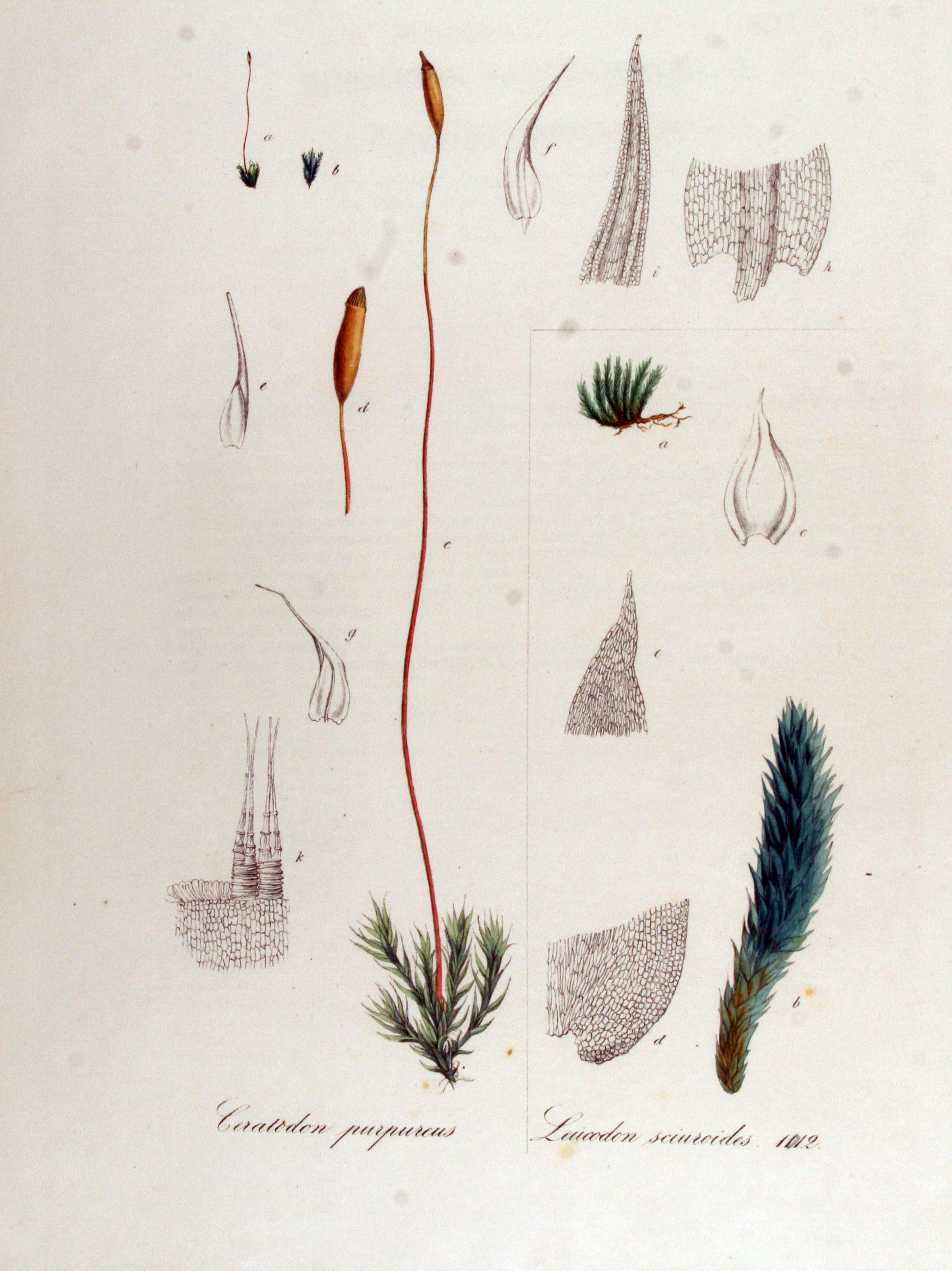 Ceratodon purpureus, Leucodon sciuroides